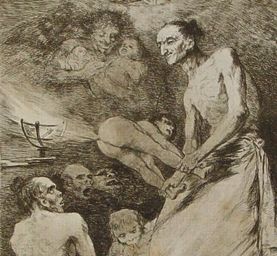 Detalle 1 del Capricho nº 69: Francisco Goya y Lucientes, Pintor de Goya, serie Los Caprichos